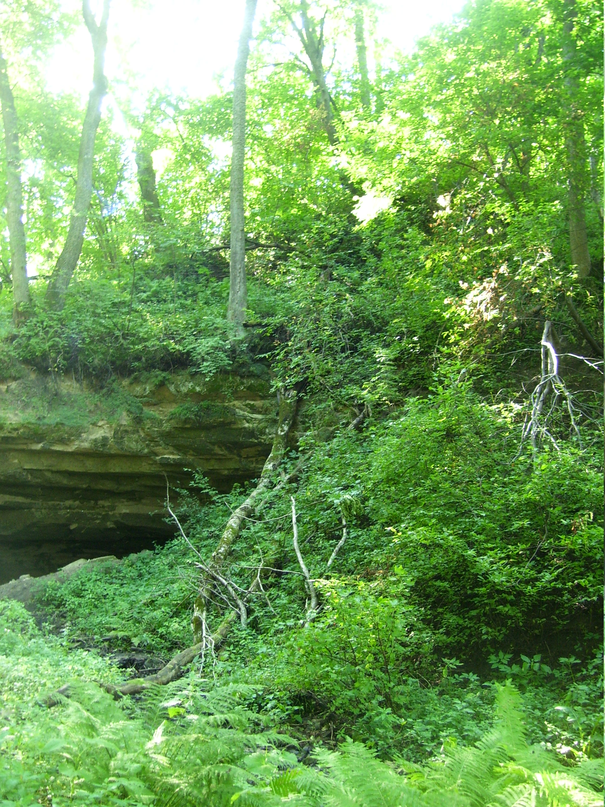 Tsitre pank Turje keldri juures